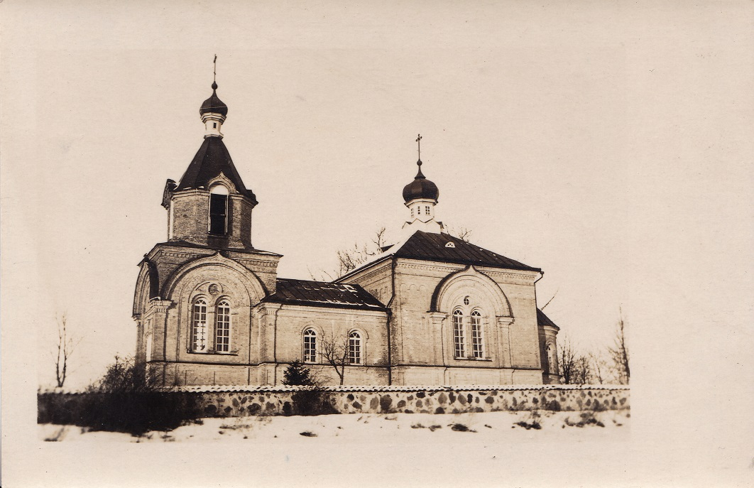 Свята-Пакроўская царква на хутары Ятвеску Свіслацкага раёна Гродзенскай вобласці Беларусі. Фотаздымак часоў Першай сусветнай вайны. Беларуская (тарашкевіца): Царква Покрыва Прасьвятой Багародзіцы на хутары Ятвеску Сьвіслацкага раёна Гарадзенскай вобласьці Беларусі. Фатаздымак часоў Першай сусьветнай вайны.